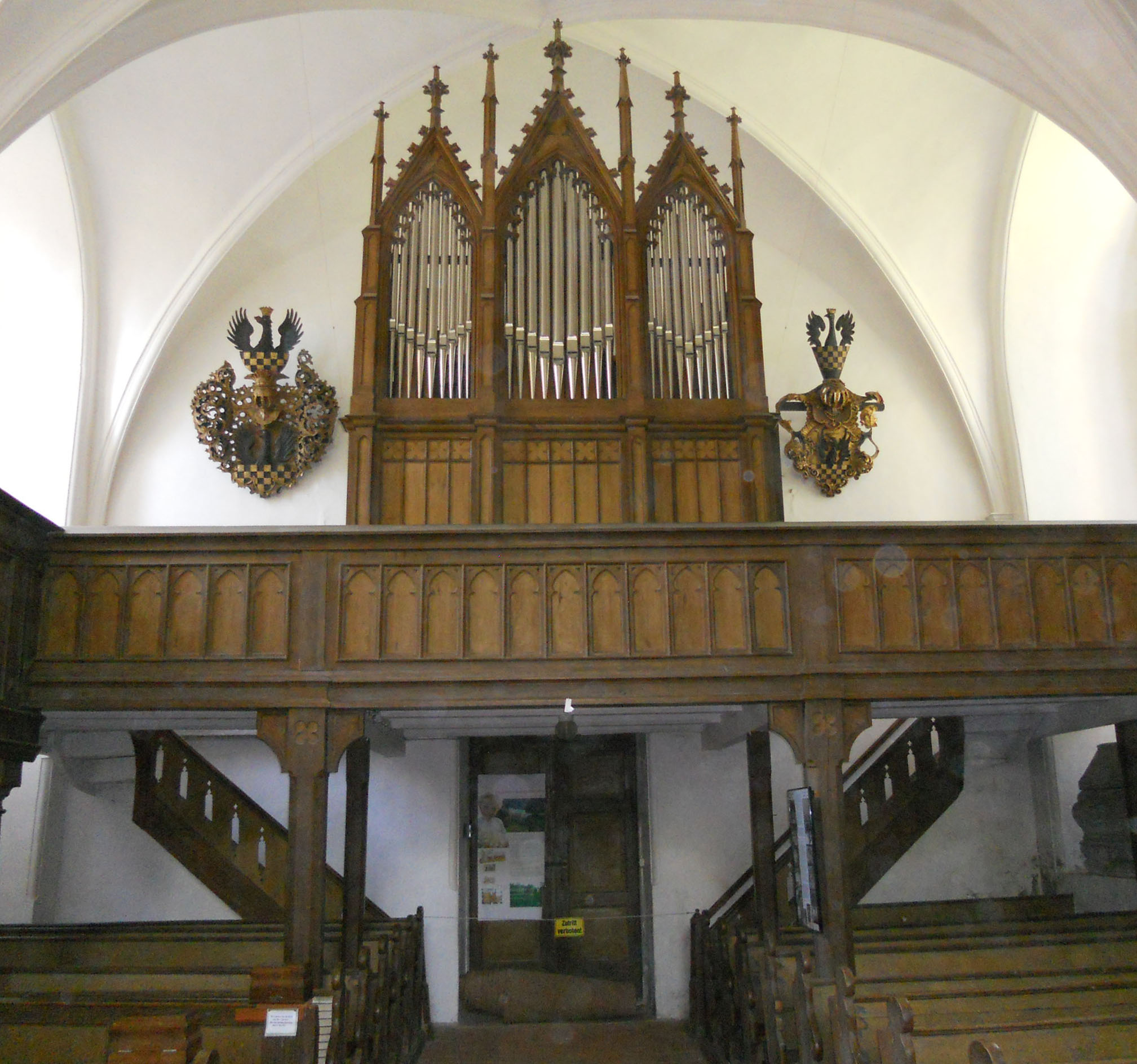 Vilmnitz Orgel